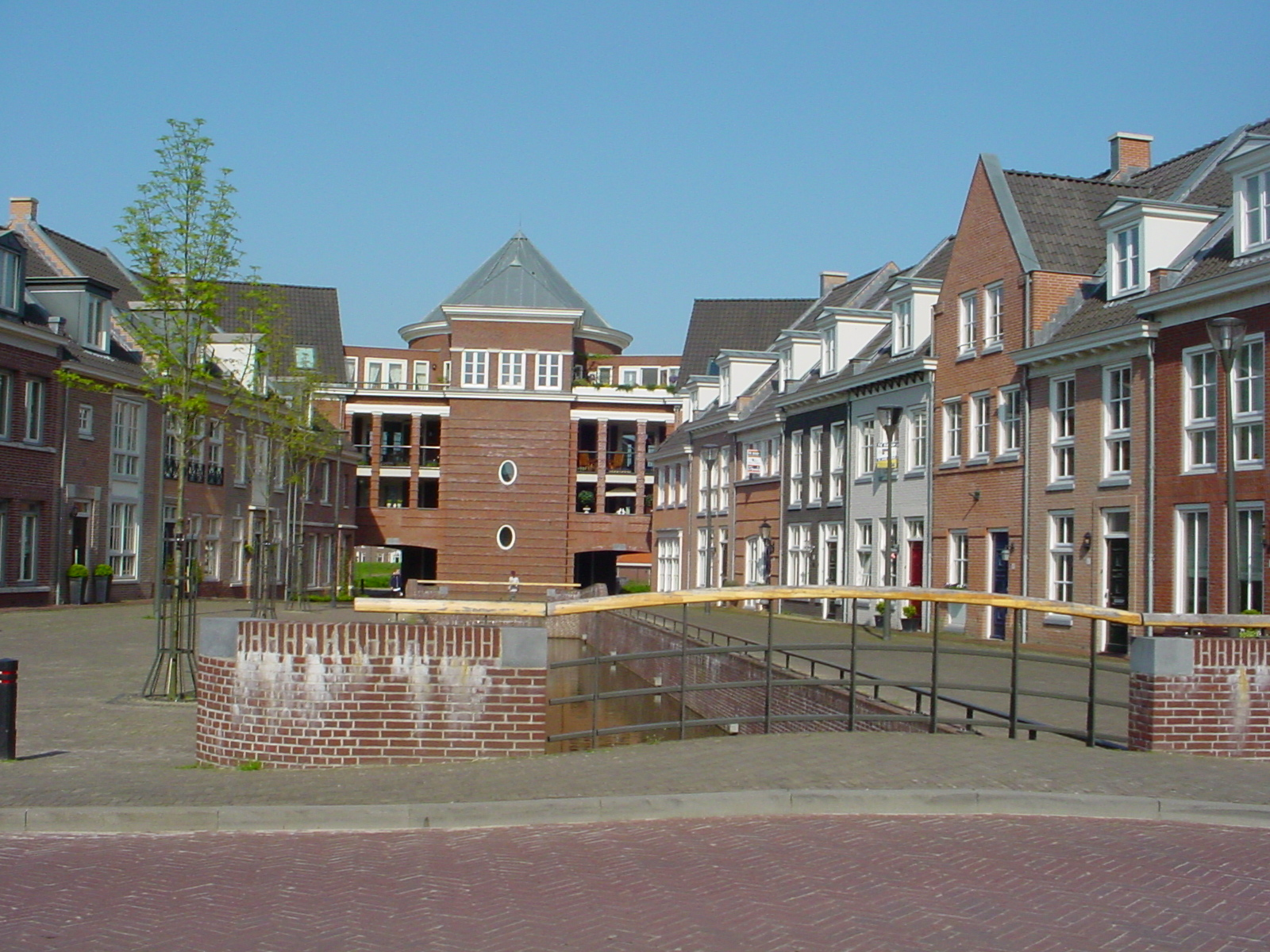 De Veste; Peter H. 2005